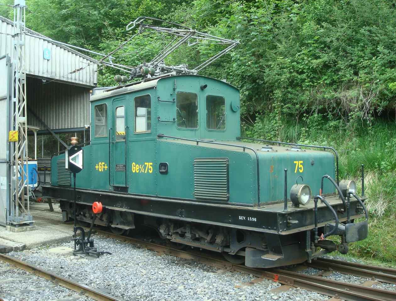 Werksbahn Elektrolokomotive Ge 4/4 75 der ehemaligen Georg Fischer Werkbahn in Schaffhausen, bei der Museumsbahn Blonay-Chamby im Juni 2010.